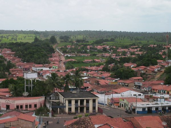 Foto do município de São Luís Gonzaga do Maranhão